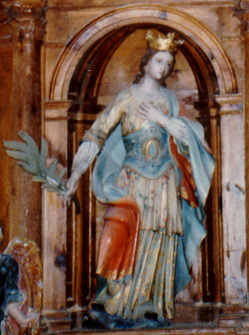 Santa Columba at Santa Coloma, in Arceniega (Álava, Spain).